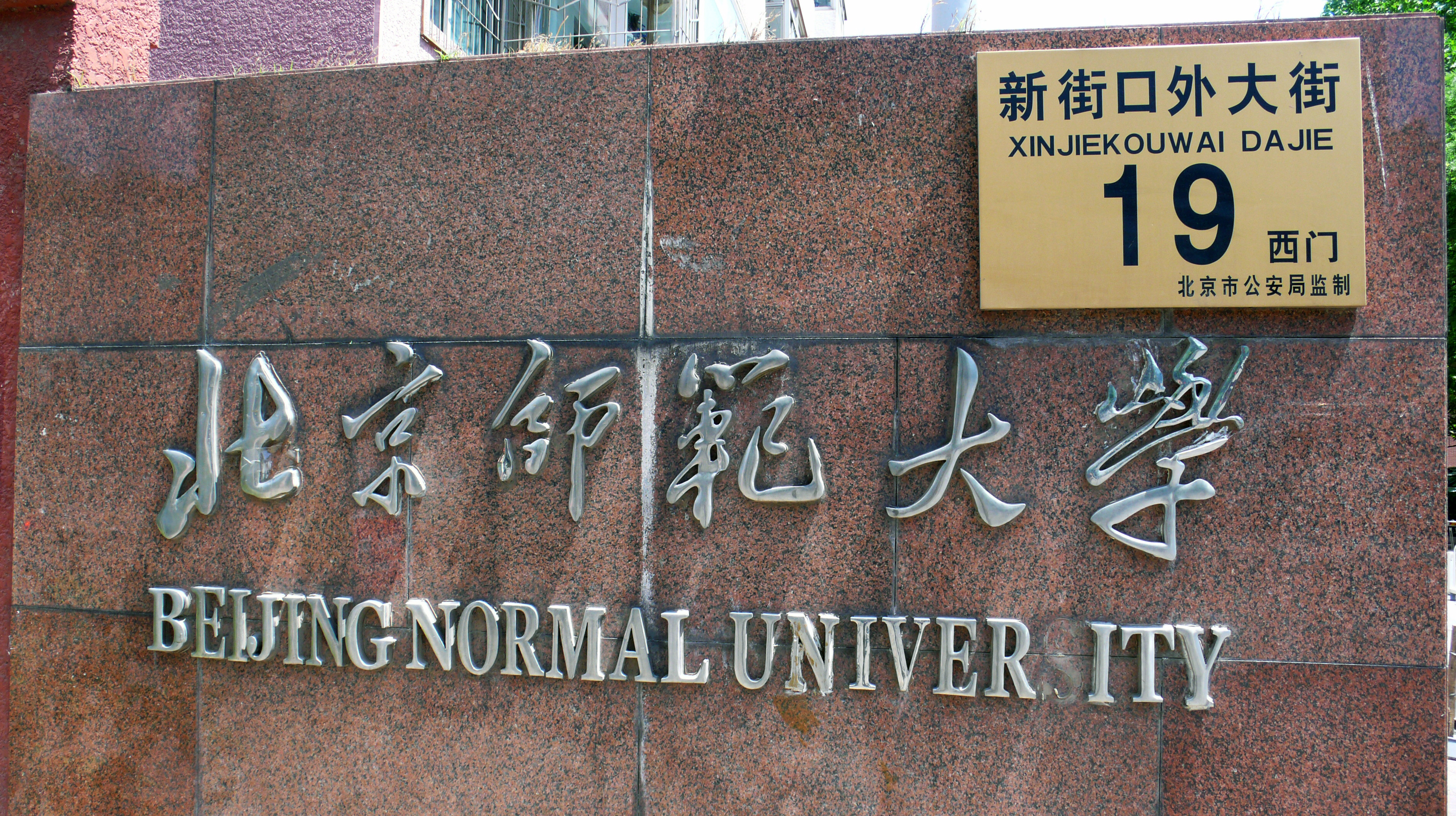 北师大西门。